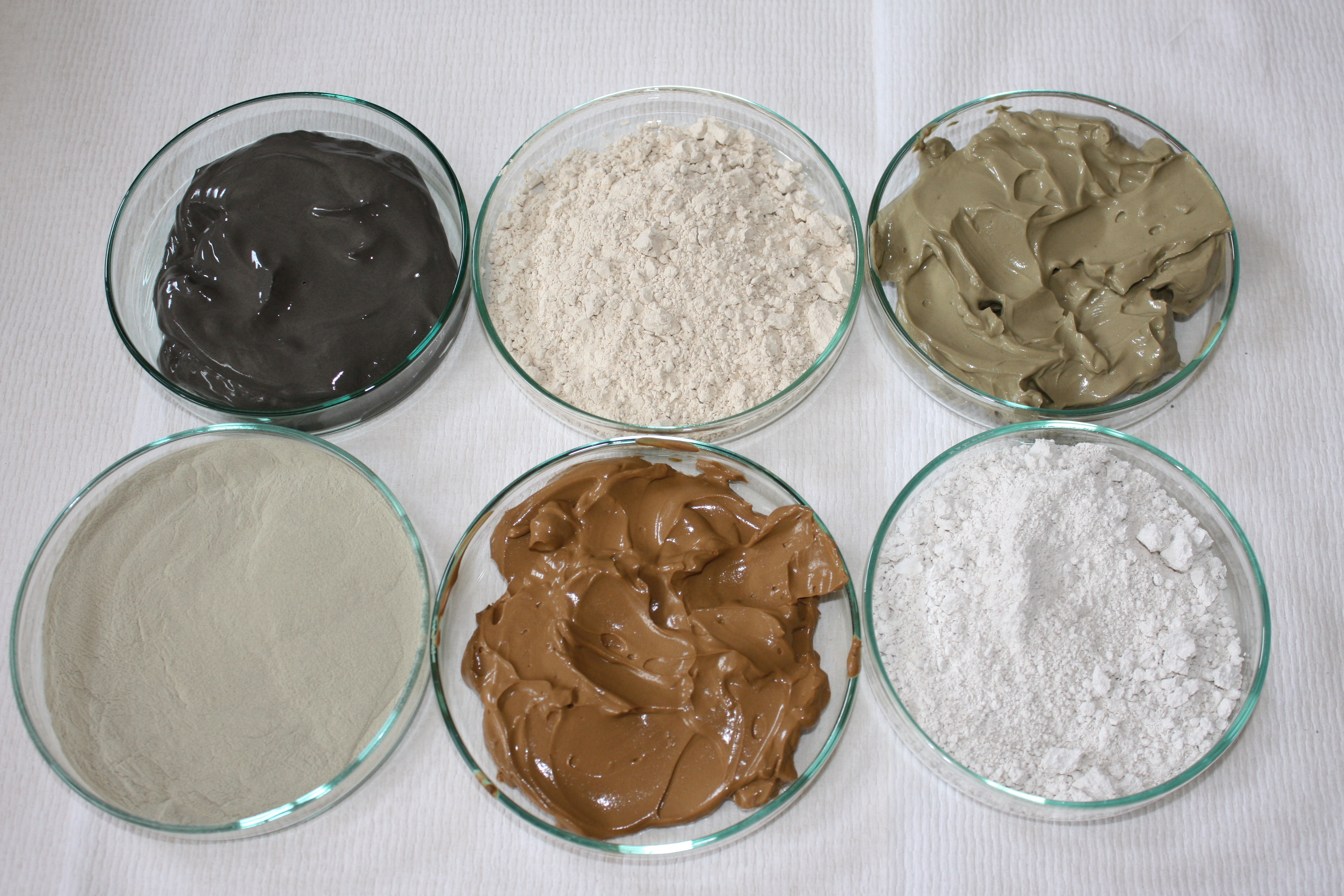 Imagen de varias muestras de peloides y arcillas.